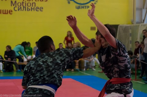 Le STENKA utilise des mouvements naturels et puissants pour la recherche d'efficacité sans codification